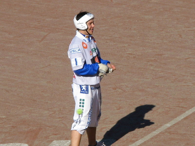 Description